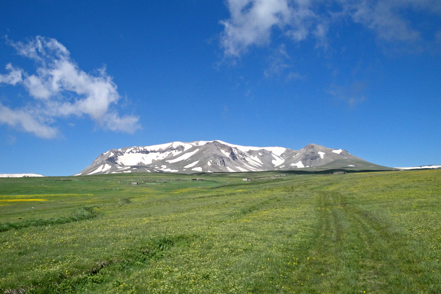 гора Спитакасар